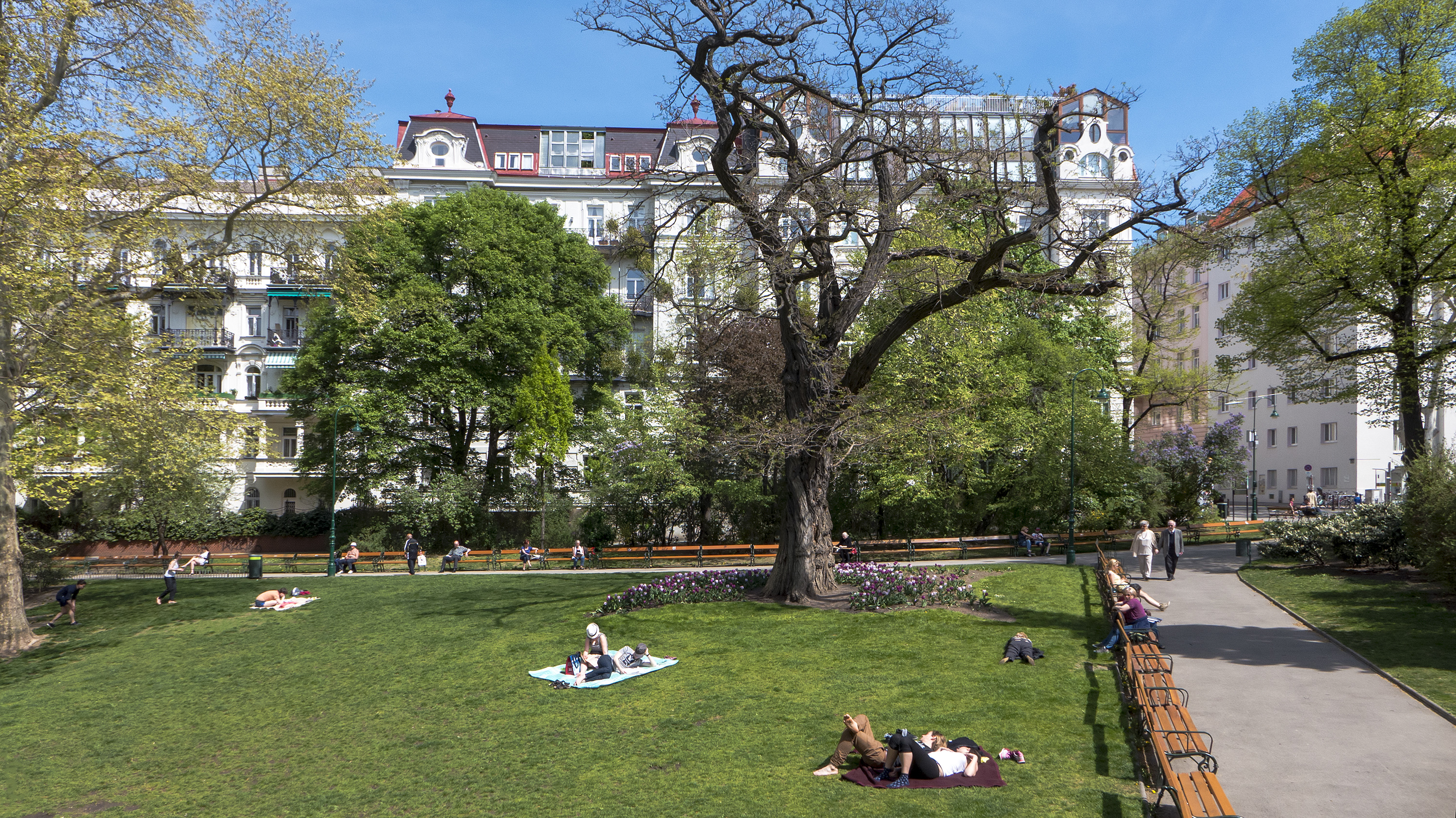 Alois-Drasche-Park in Wien 4